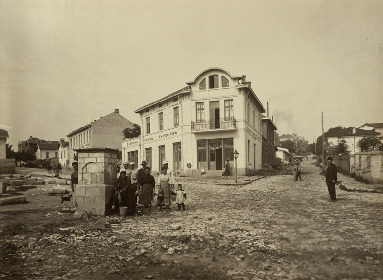 Фабрика за земеделски оръдия и огнеупорни железни каси на Иван Бурджев в Плевен. Основано в 1891 г. с основен капитал 10 000 лева, с 8 работници. През 1912 г. е с основен капитал 400 000 лева и 150 работници. Фотоалбум с фотографии на български индустриални предприятия от периода 1887-1912 г., подарен от Съюза на българските индустриалци на цар Фердинанд І по случай 25-годишнината от възшествието му на българския престол.